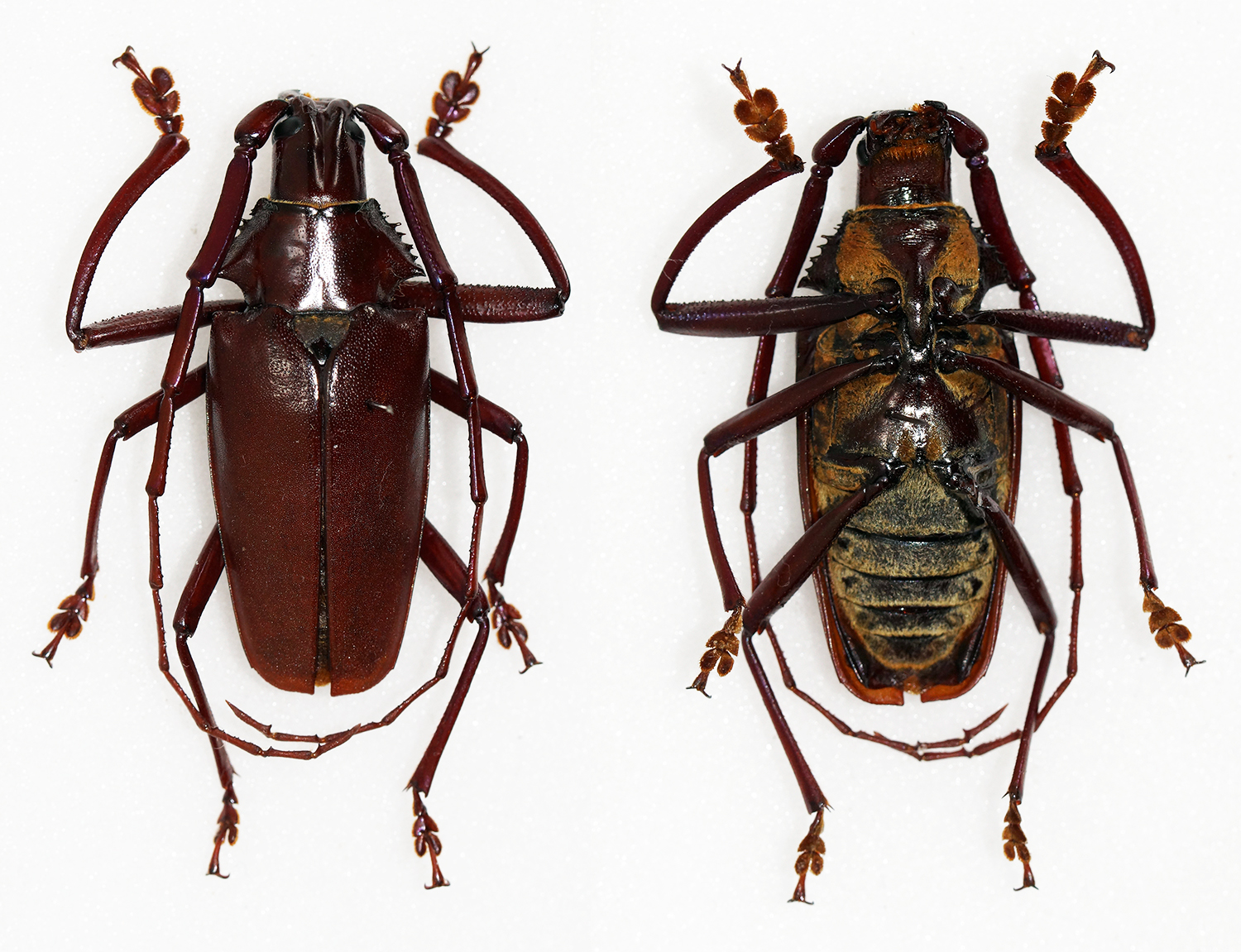 White,1853 Sex: Male Data: 03-2014 - La Muralla - Atlantida - Honduras Size: 43mm